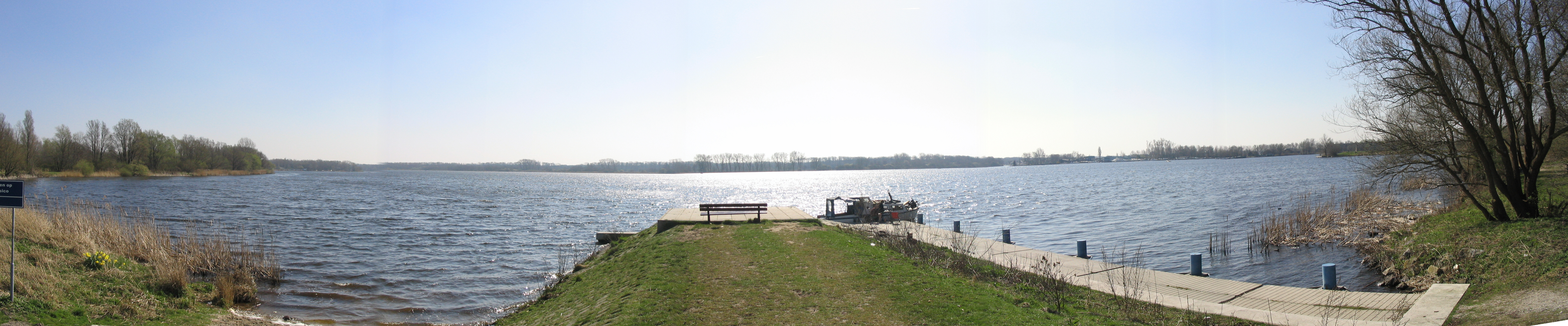 "Amsterdamse Bos", Amstelveen